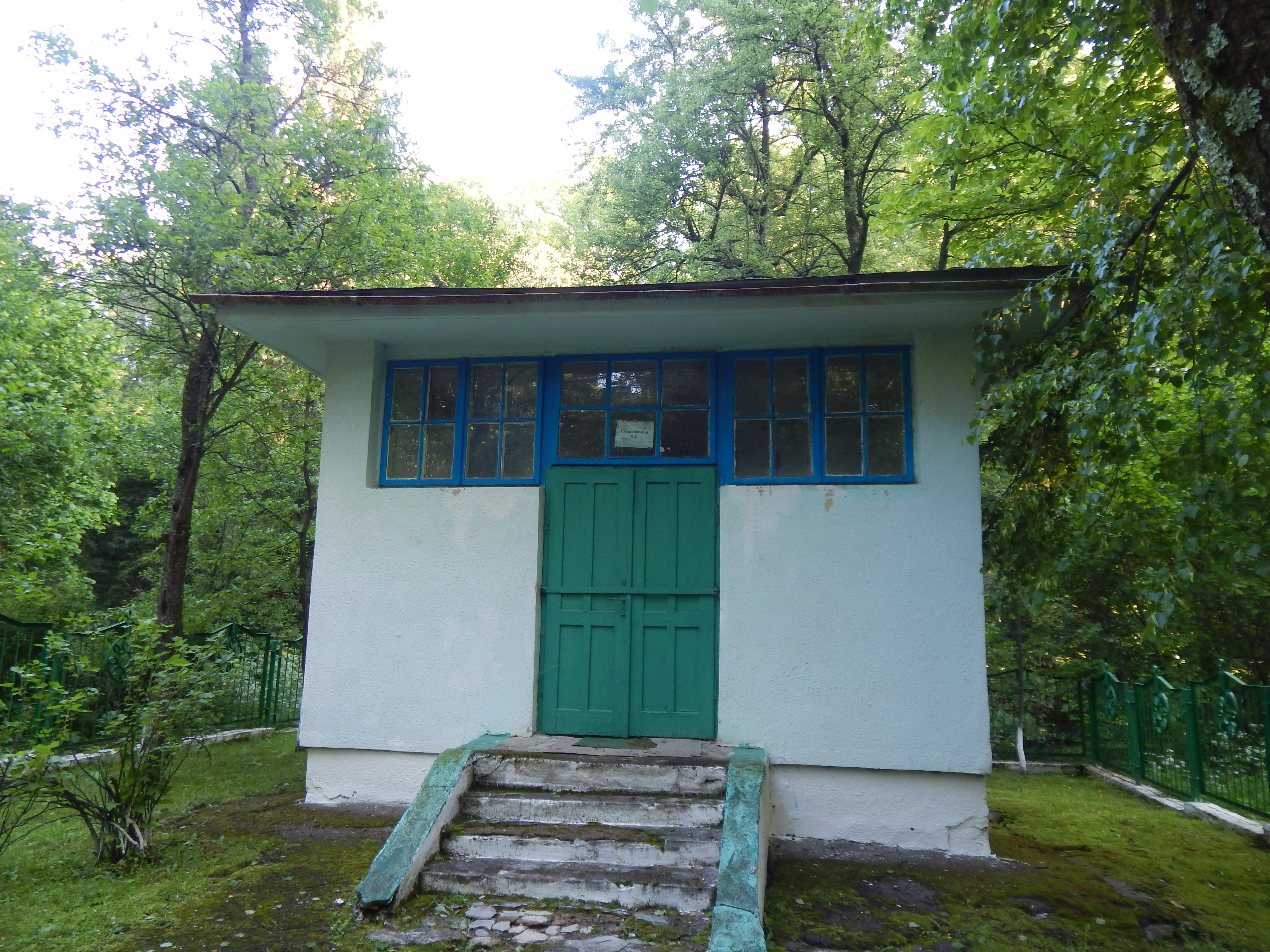 Курортний парк, Дрогобицький р-н, м. Трускавець